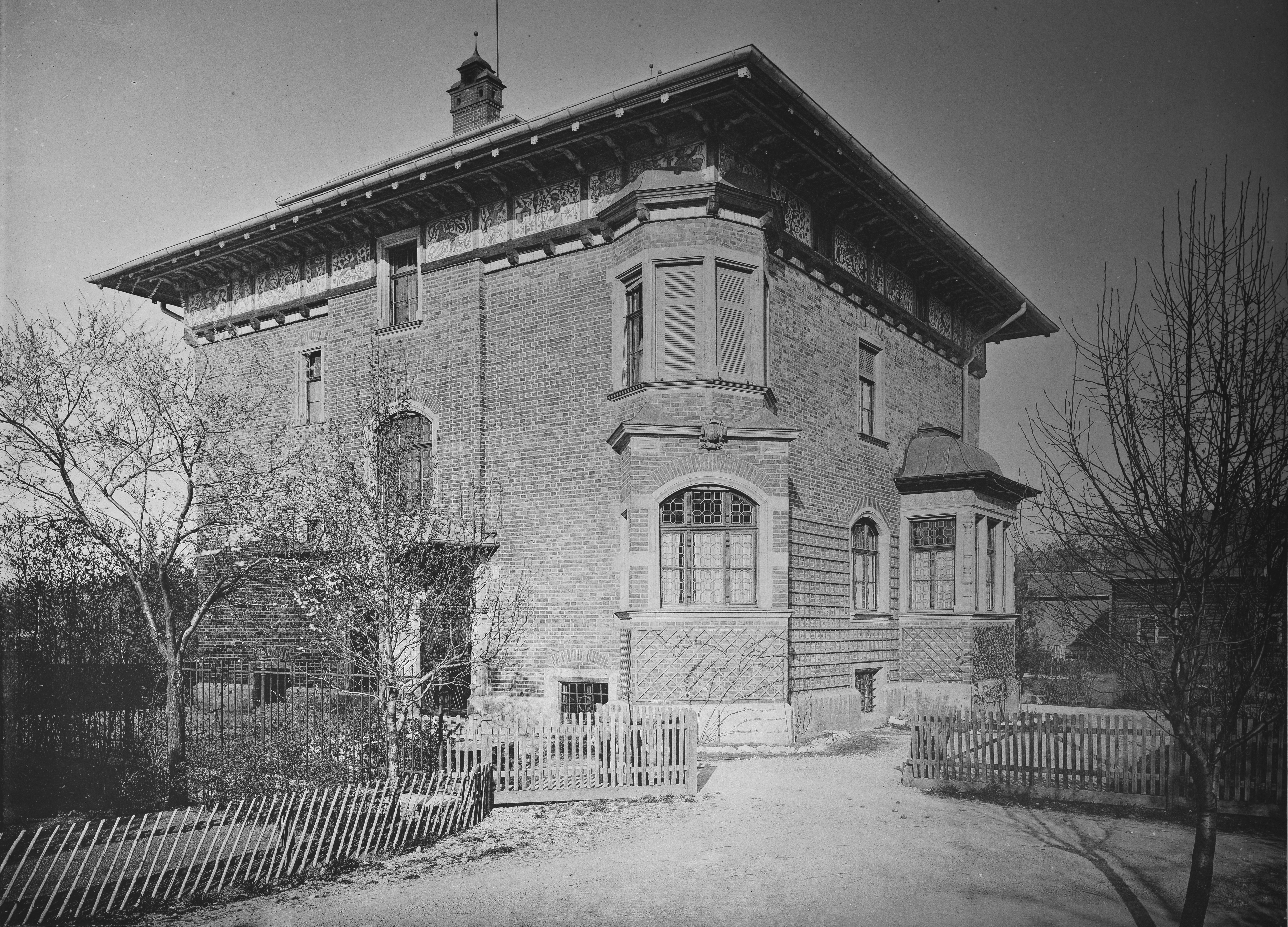 eigenes Wohnhaus des Architekten Friedrich (von) Thiersch in München, Georgenstraße 15a (später 18); Blick von Süden; im Zweiten Weltkrieg zerstört